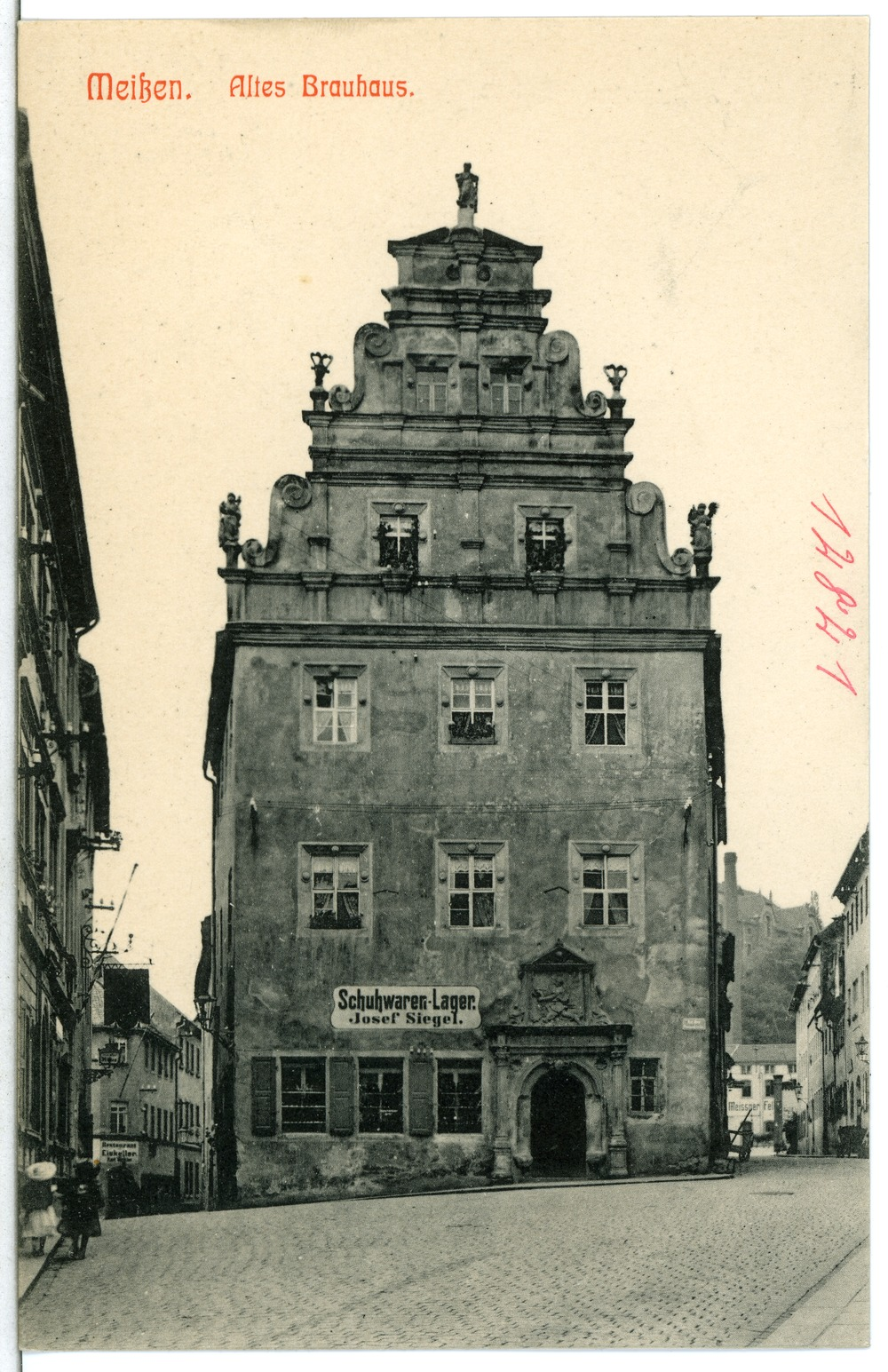 Meißen; Altes Brauhaus This postcard is from publisher Brück & Sohn in Meißen ( postcard has a unique number 12821 and is available in a higher resolution at the publisher. This images was uploaded in a cooperation project between Wikipedians and the publisher.